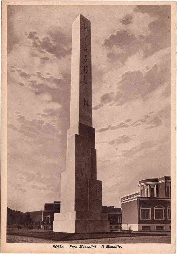 RM Roma Foro Mussolini - il monolite